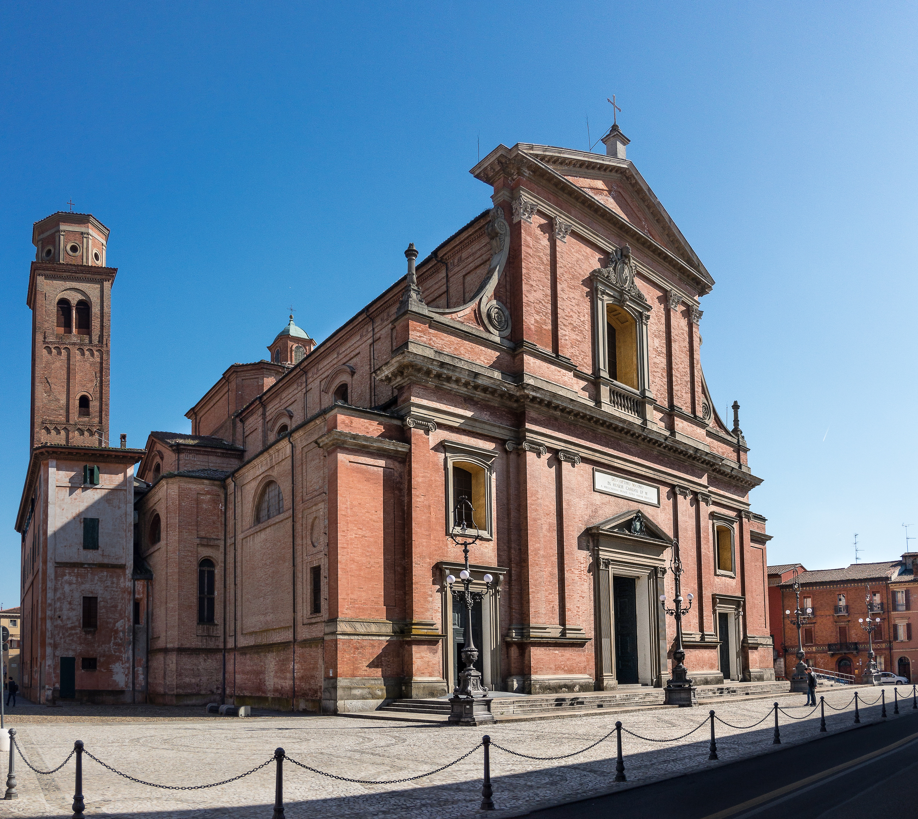 Cattedrale di San Cassiano This is a photo of a monument which is part of cultural heritage of Italy.